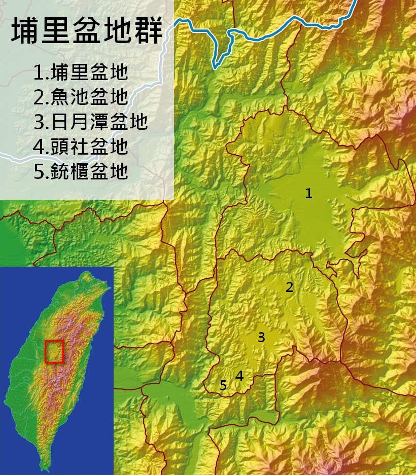 PuLi basin of Taiwan